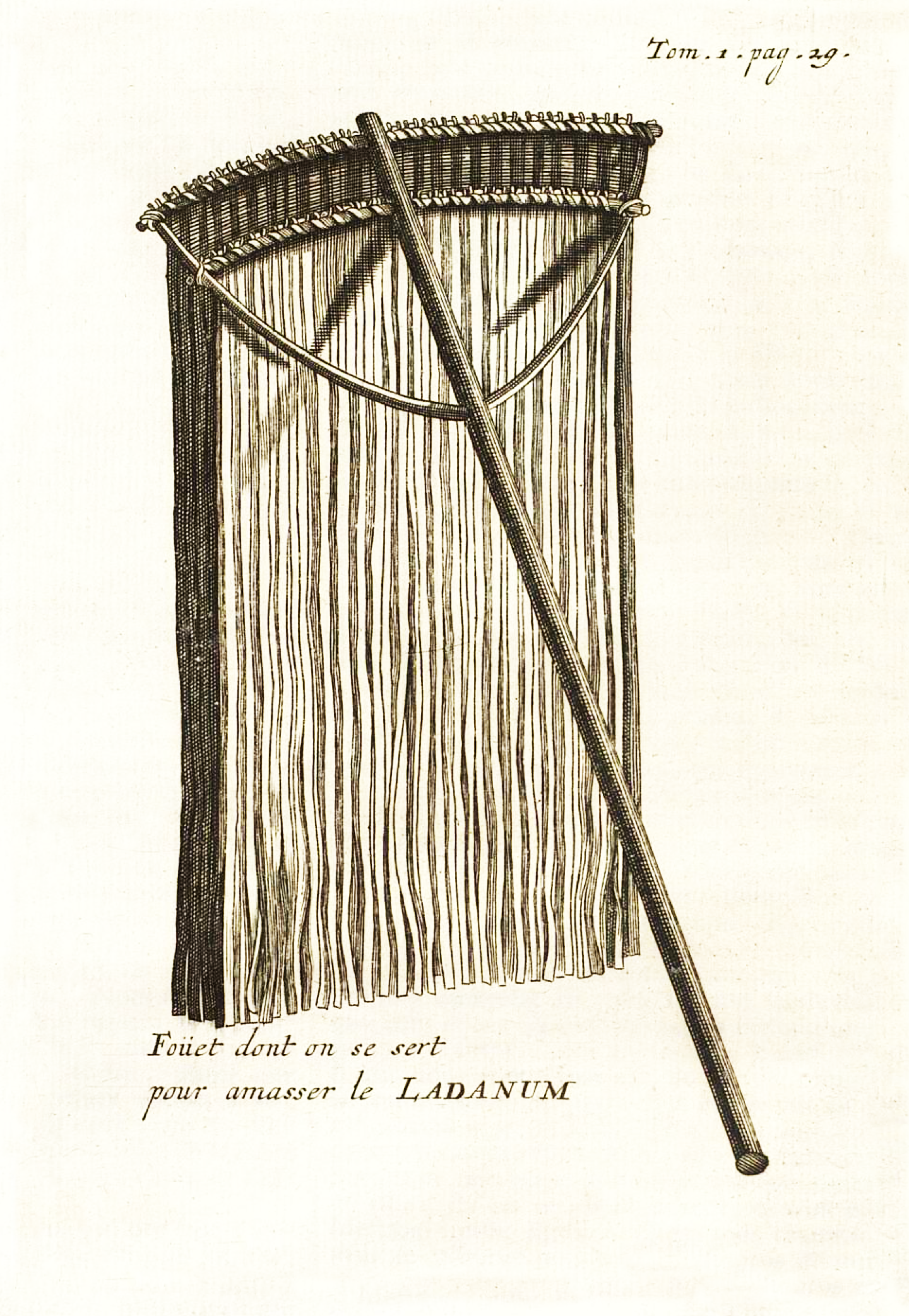 Fouet dont on se sert pour amasser le Ladanum